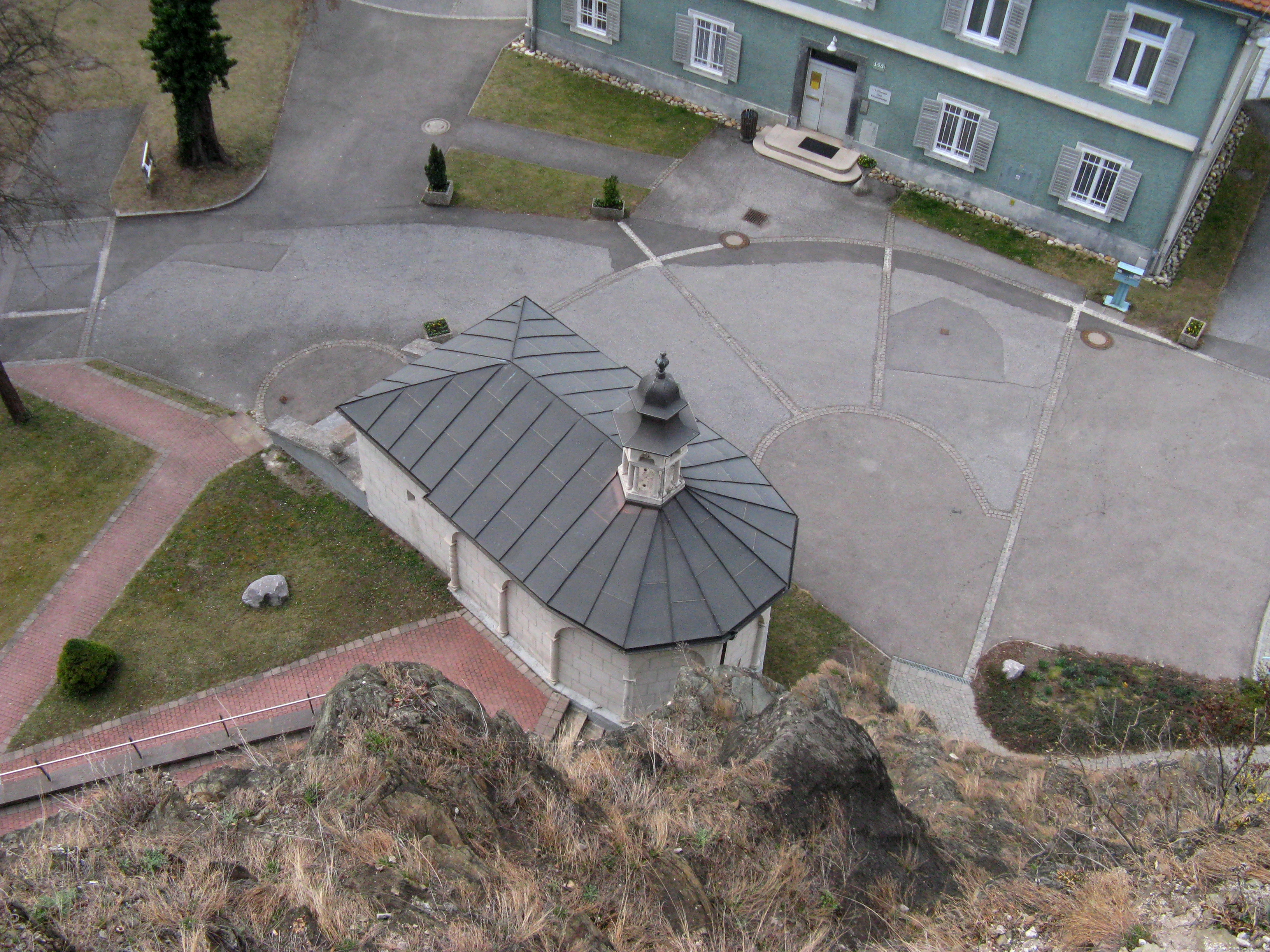 Ausblick vom Grazer Kalvarienberg auf die Heiliges-Grab-Kapelle